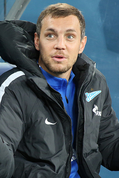 «Динамо» СПб - «Зенит»